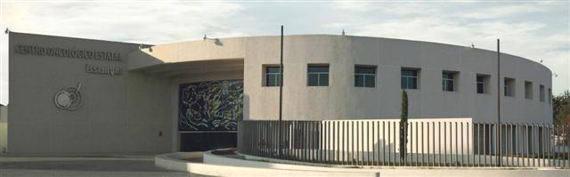 Entrada del Centro Oncológico Estatal ISSEMyM.